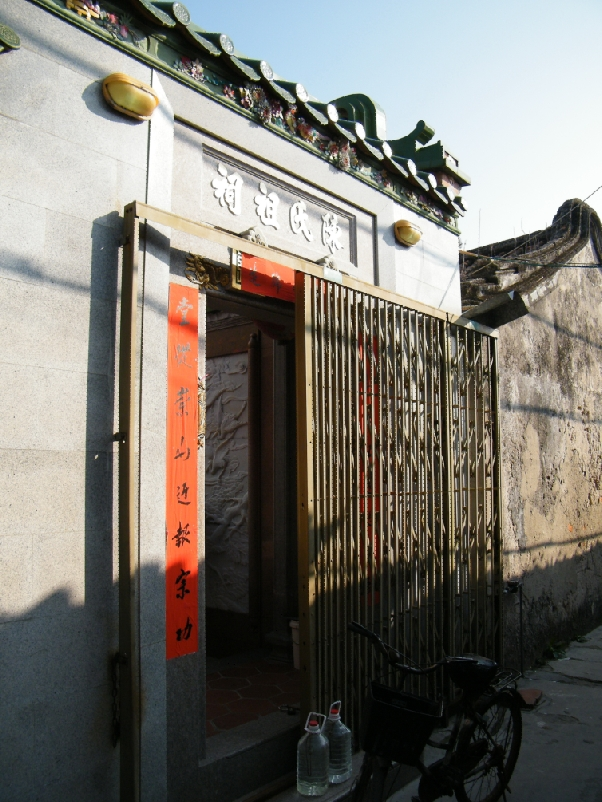 赤港陈氏祠祠之一 安埕巷